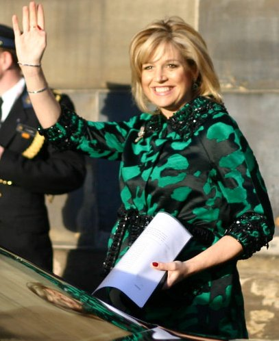 Máxima Zorreguieta when pregnant